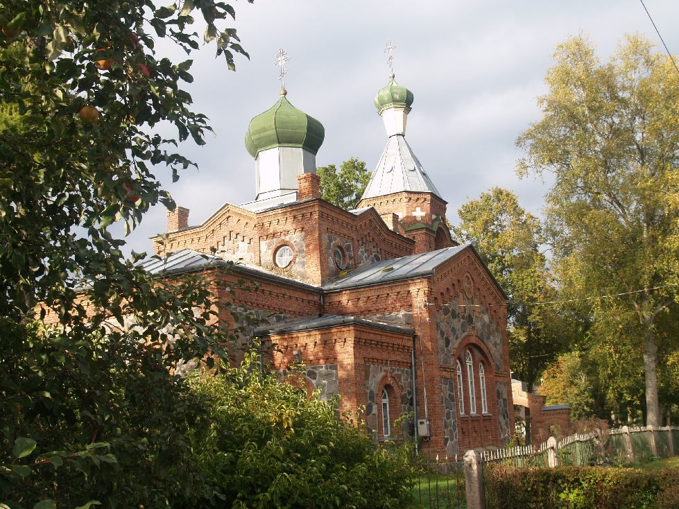 Põltsamaa vaade